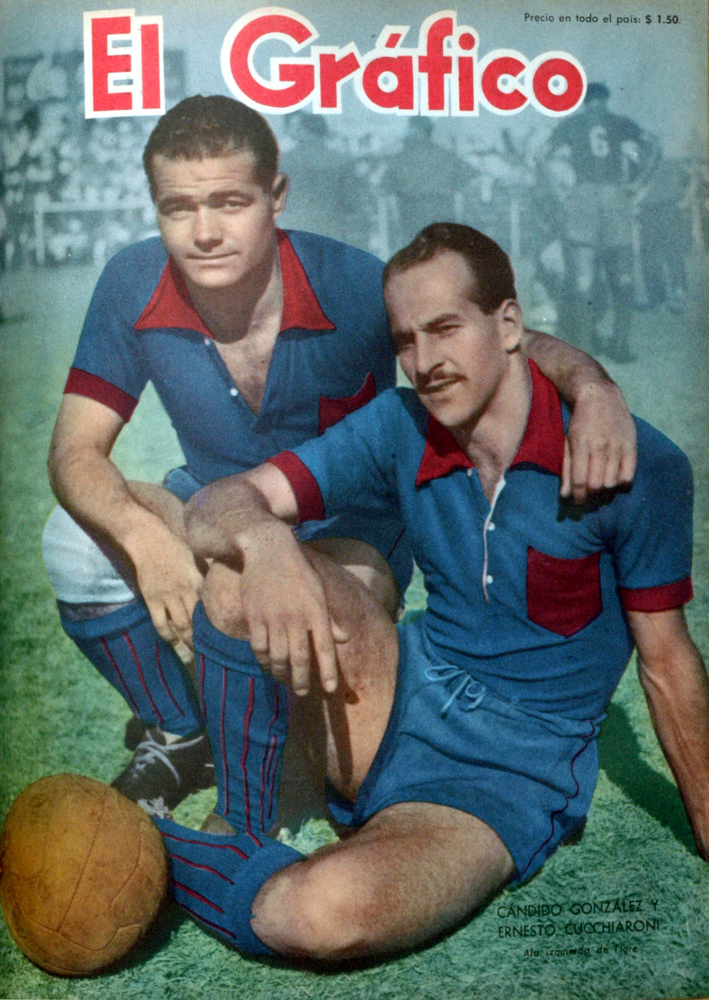 El Grafico del 15 de Enero de 1954. Edicion 1797